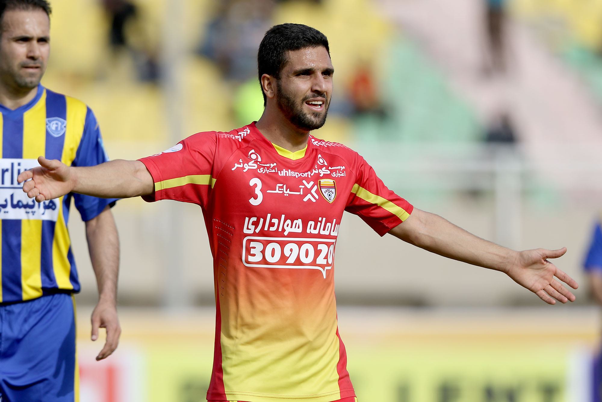 بازیکن فوتبال فولاد خوزستان